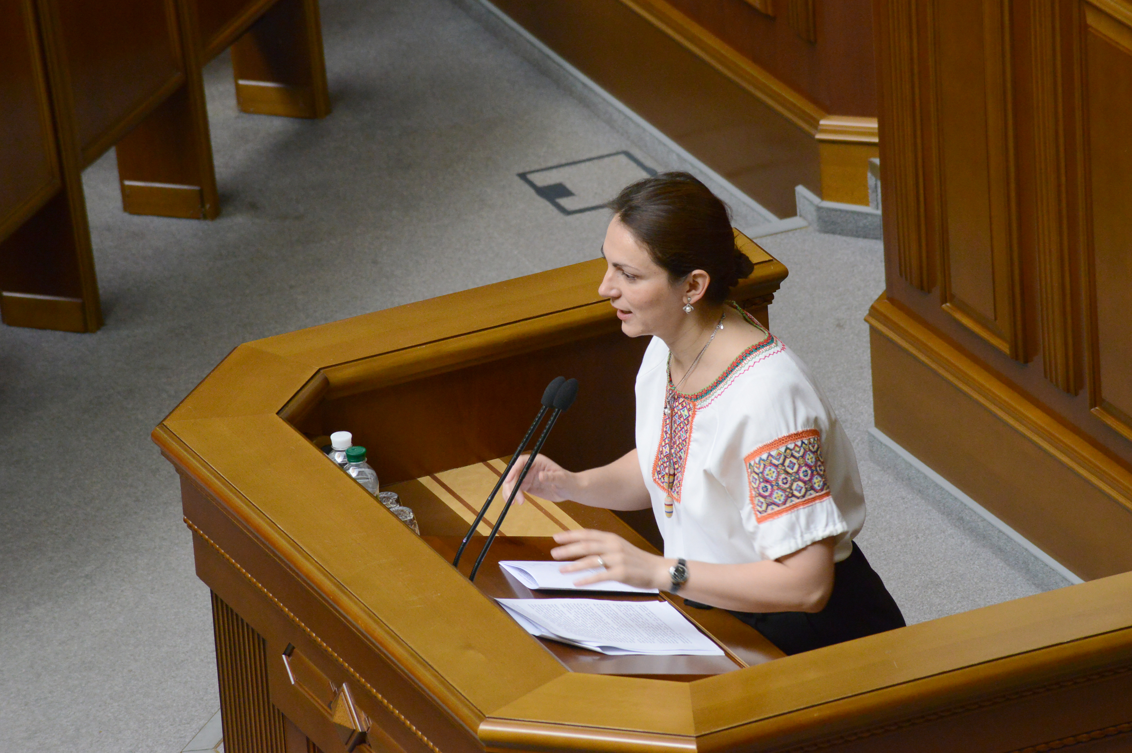 ВЕРХОВНА РАДА УКРАЇНИ 2015 фотограф Вадим Чуприна